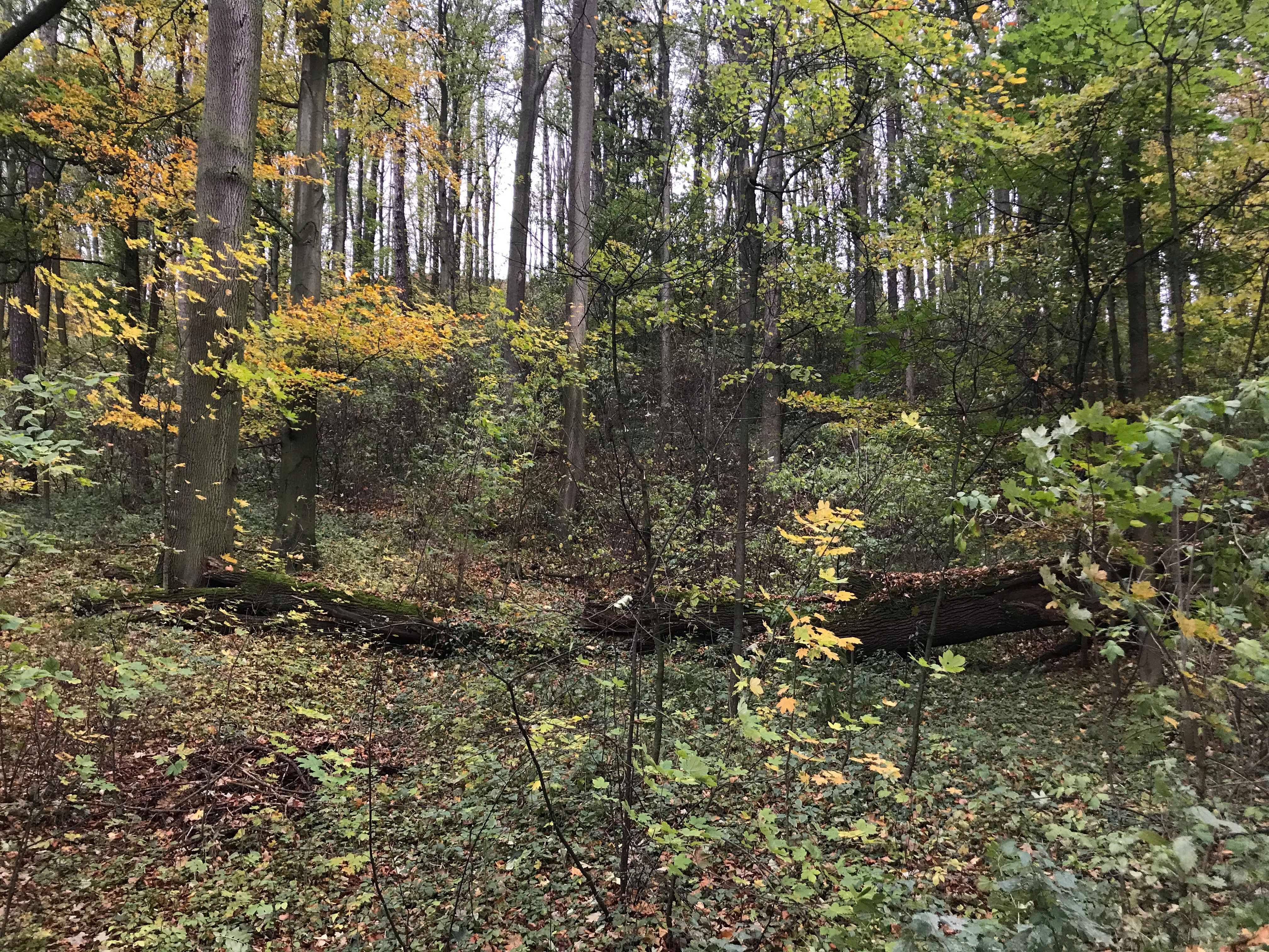 NPP Babiččino údolí, louka